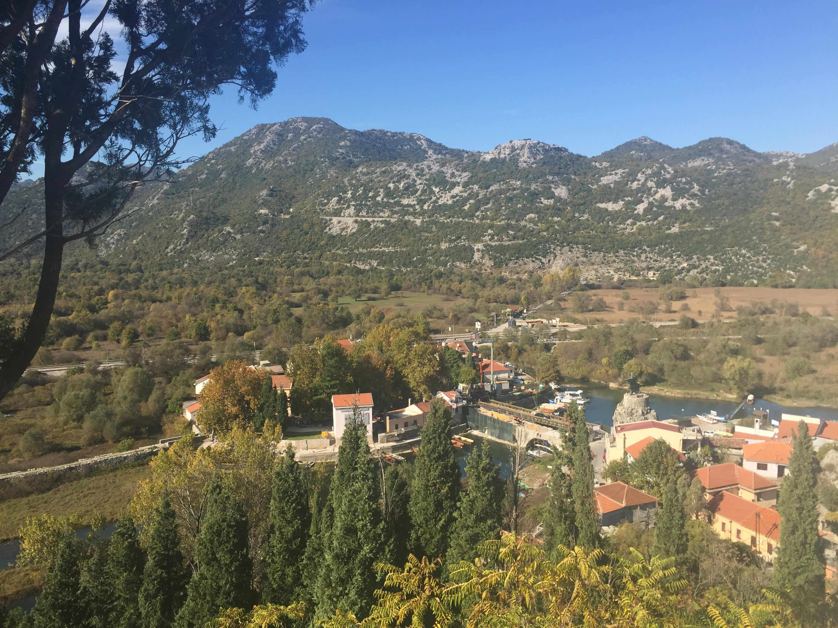 Вир